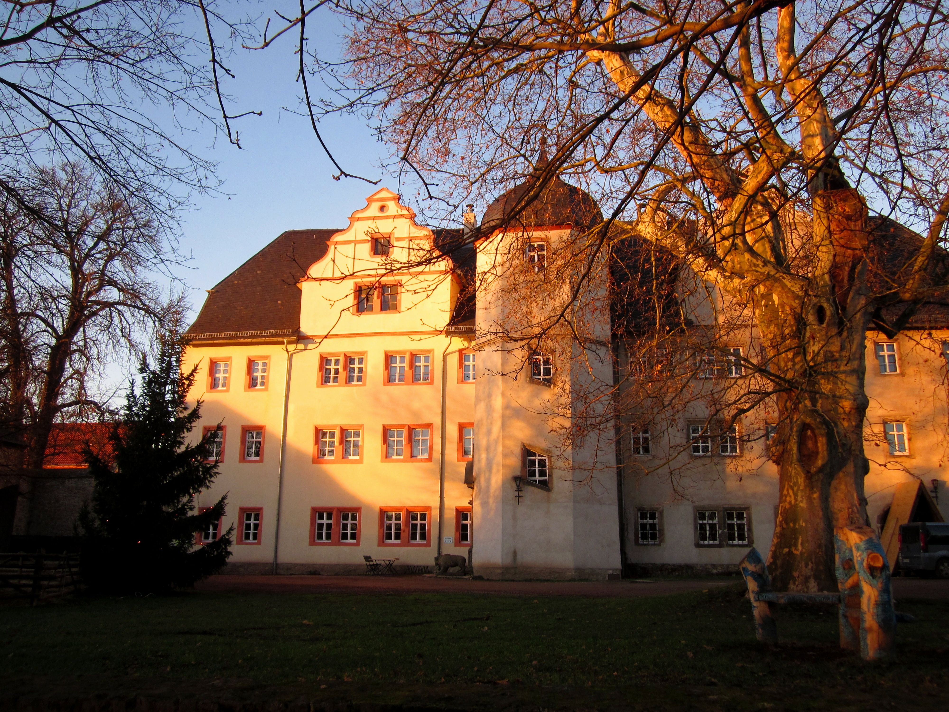 Südseite Schloss Kromsdorf mit sanierter Fassade und Treppenturm